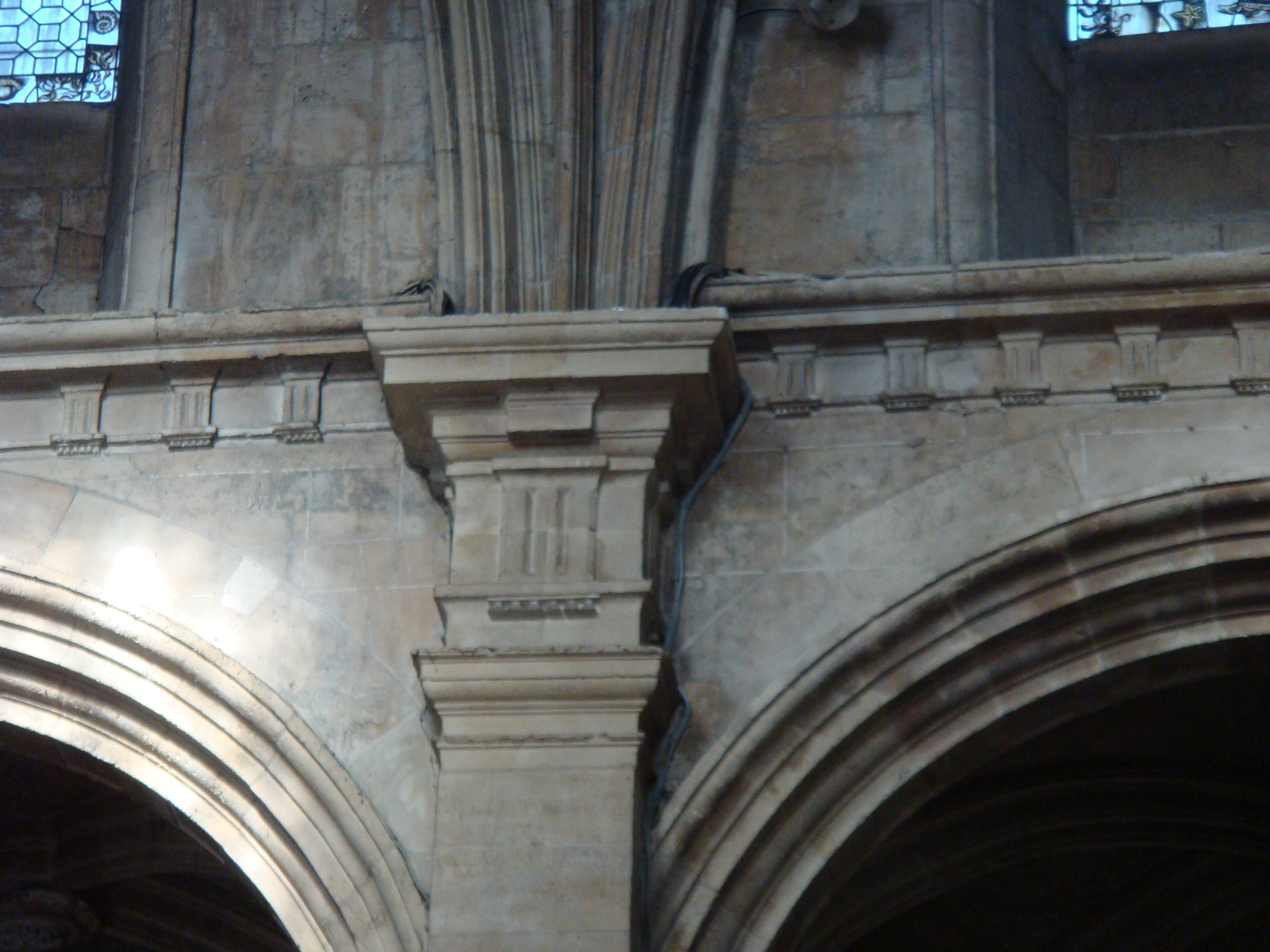 Chapiteau de style dorique de pilastre (soutient les croisés d'ogives) , corniche et frise en triglyphe.